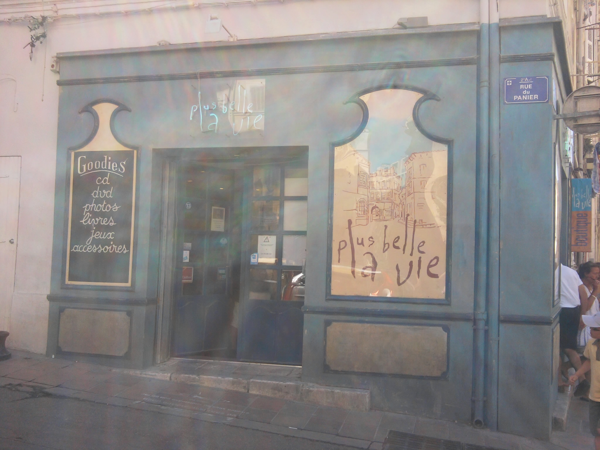 Boutique du célèbre feuilleton télévisé Plus belle la vie, située rue du Panier à Marseille (Bouches-du-Rhône, France)